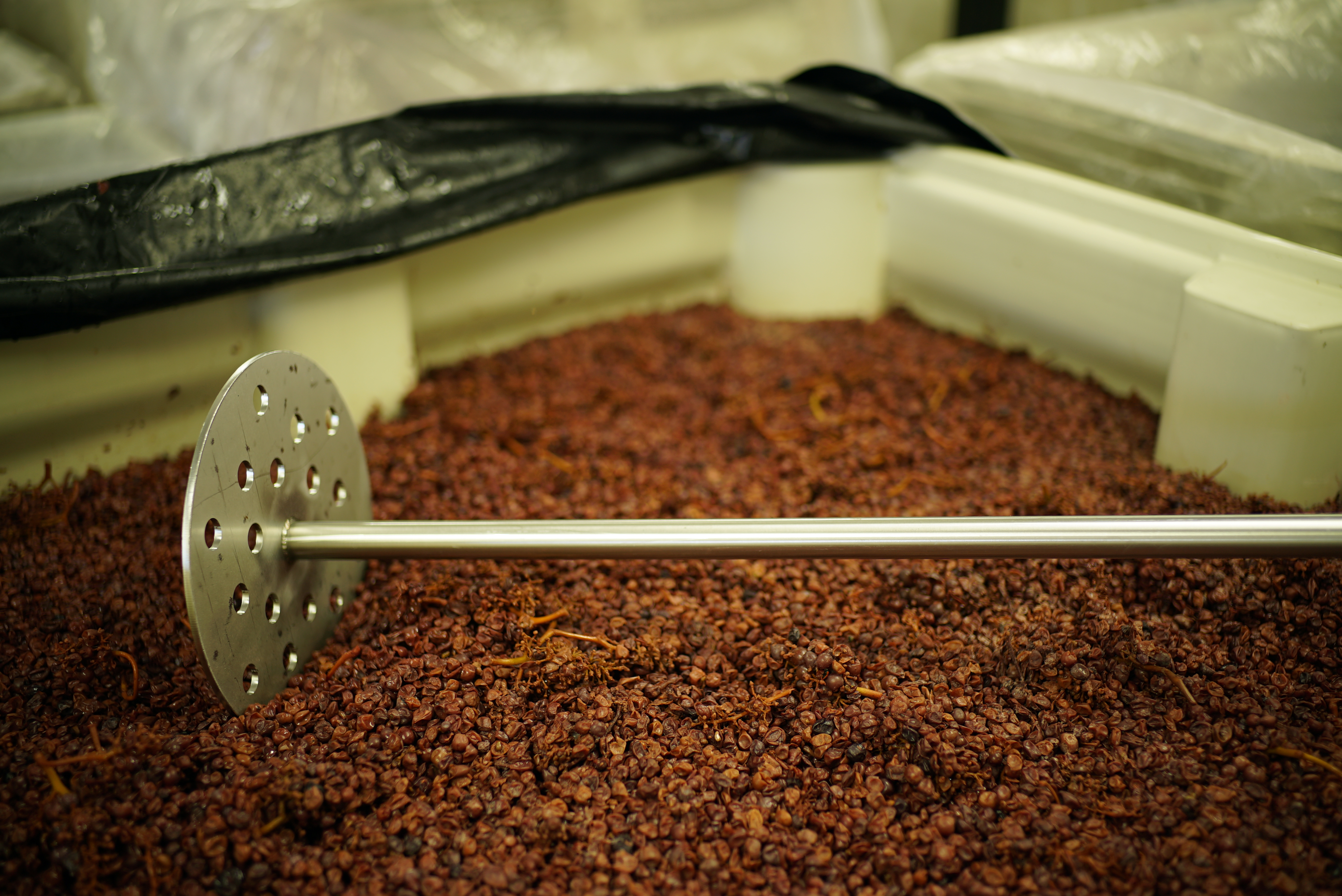 Pigeage